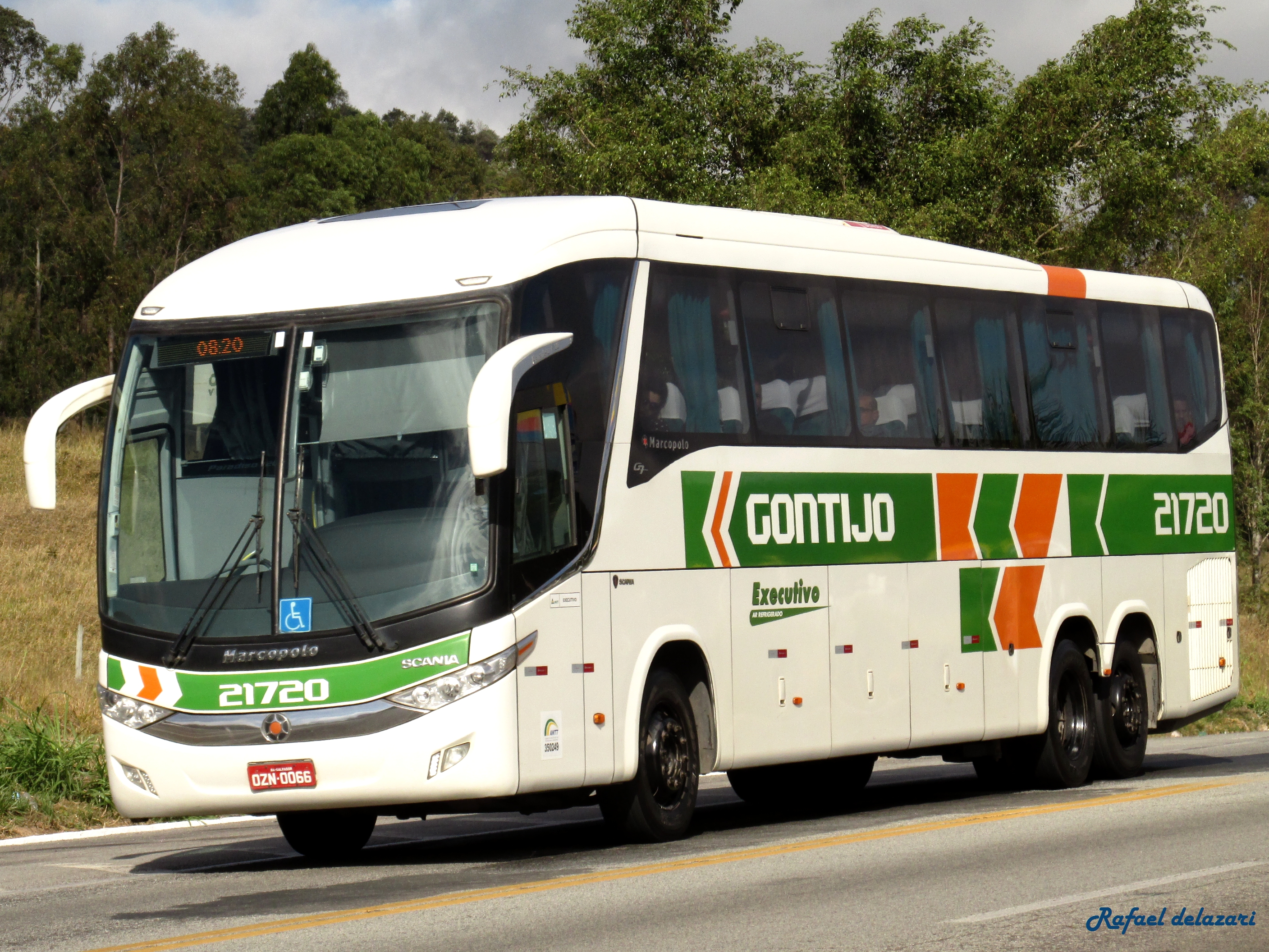 Gontijo - 21720